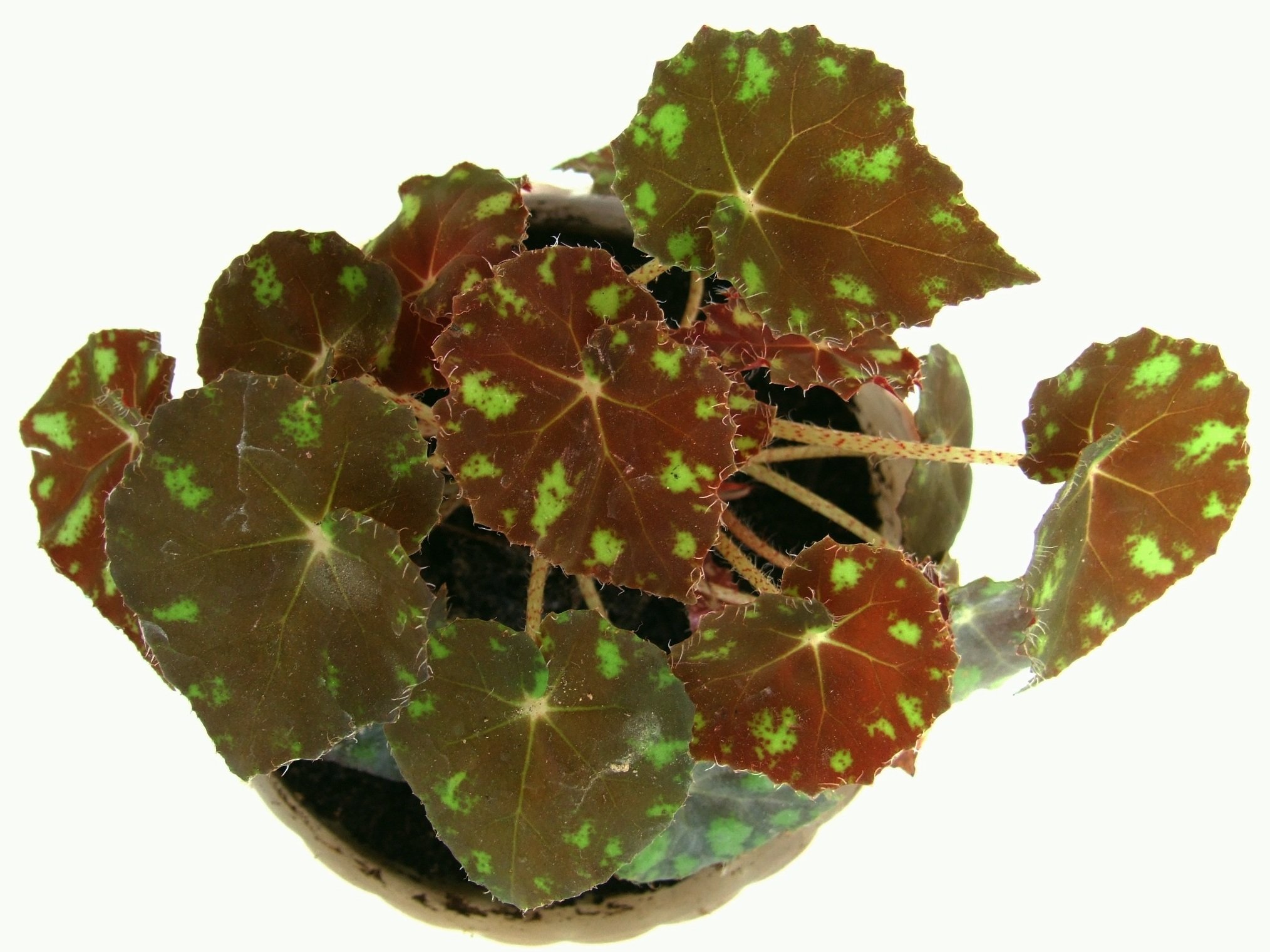 Begonia bowerae `Tiger` (pl. begonia tygrysia)